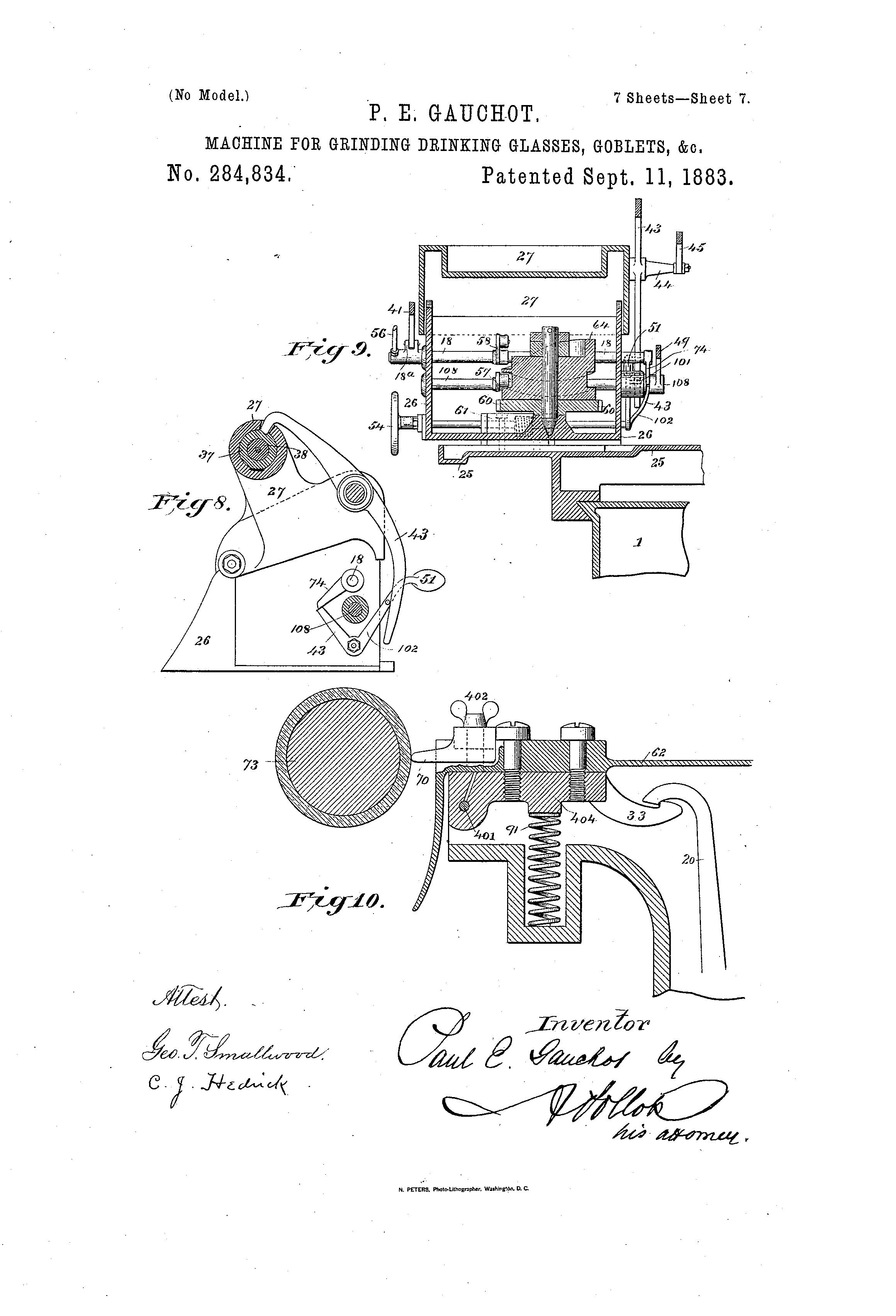 Principe du broyage de verres à boire, par Paul-Élie Gauchot, déposé en France le 25 mars 1880, en Allemagne le 4 juillet 1880, en Angleterre le 5 juillet 1880 et aux États-Unis le 11 septembre 1883 (expiration universelle du brevet le 11 septembre 1900).